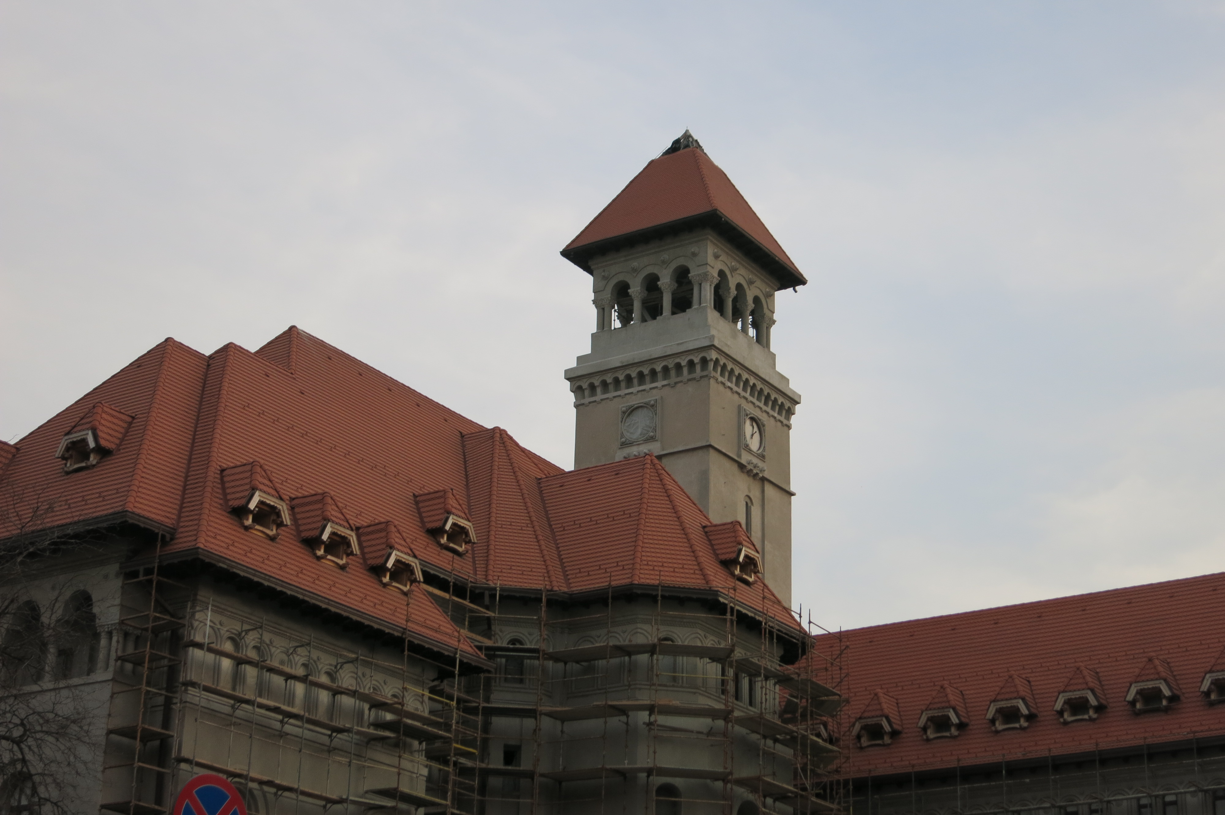 Primăria Sectorului 1 municipiul București , Bd. Banul Manta 9 sector 1 1927-1929